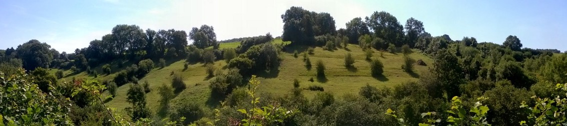 Dans la vallée du ruisseau du Wayot à Theux, depuis 2010, des travaux de réouverture du milieu réalisés par l’asbl Natagora ont permis aux graines de la flore typique de ce milieu calcaire (orchidées, plantes aromatiques, thym, origan ou basilic sauvages) de retrouver place : cette biodiversité fascinante est très rare en Wallonie.